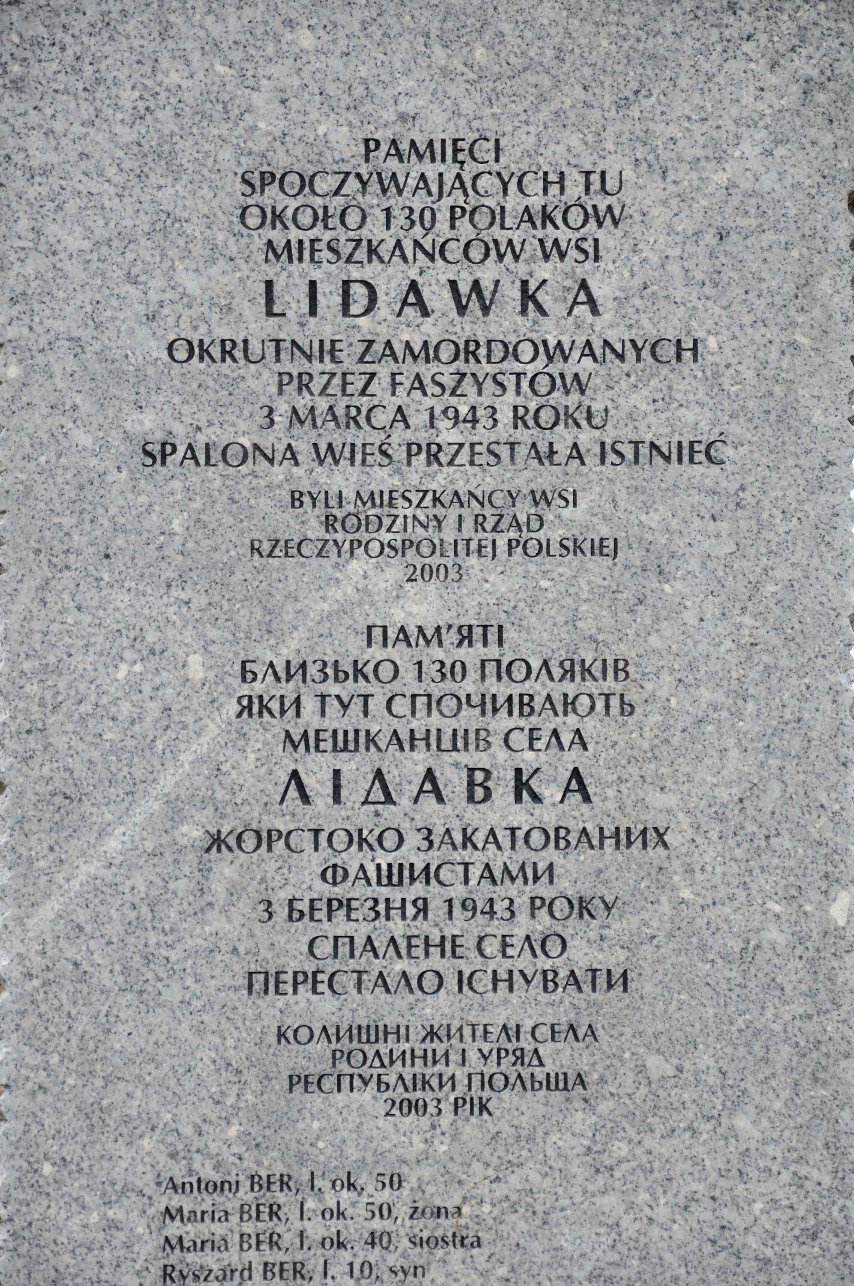 Місце спалено села та братська могила жертв фашизму, с. Пашуки